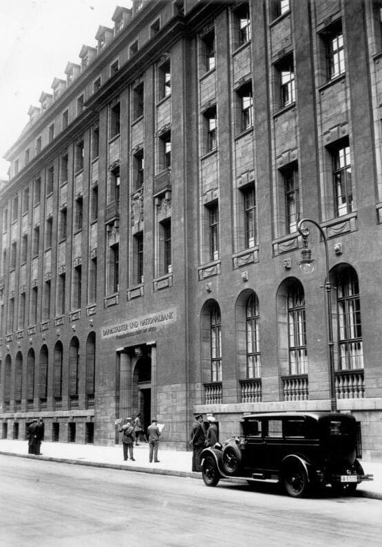 Zenralbild Berlin 1931 Das Verwaltungsgebäude der "Darmstädter und Nationalbank" in der Behrenstraße 5. 22363-31